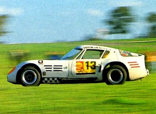 Prototipo Martos-Chevrolet de Turismo Carretera, año 1969.